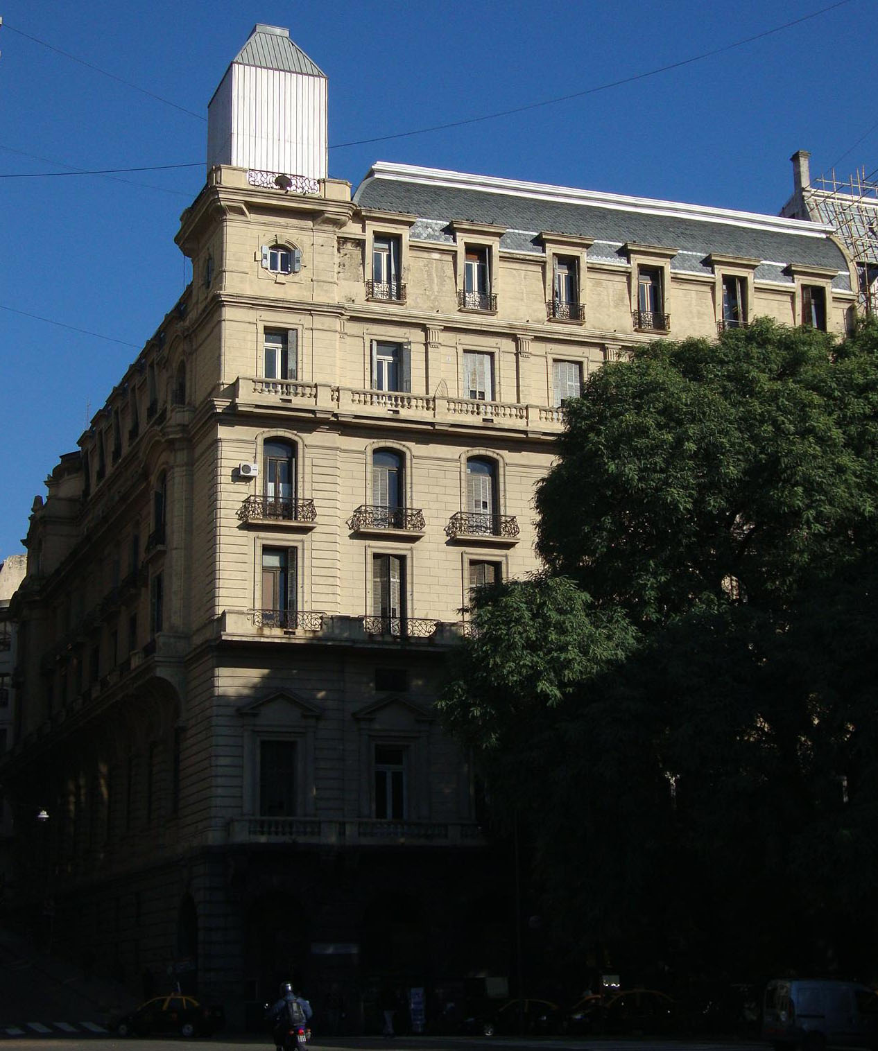 Vista desde la esquina de Av. Leandro Alem y Juan D. Perón del edificio construido para el empresario naviero Nicolás Mihanovich como "Palace Hotel". Luego sede del Banco Hipotecario, actualmente sede de los Institutos de Investigación de la Facultad de Filosofía y Letras de la Universidad de Buenos Aires. Arquitecto: Carlo Morra. 25 de Mayo 221. Buenos Aires, Argentina.